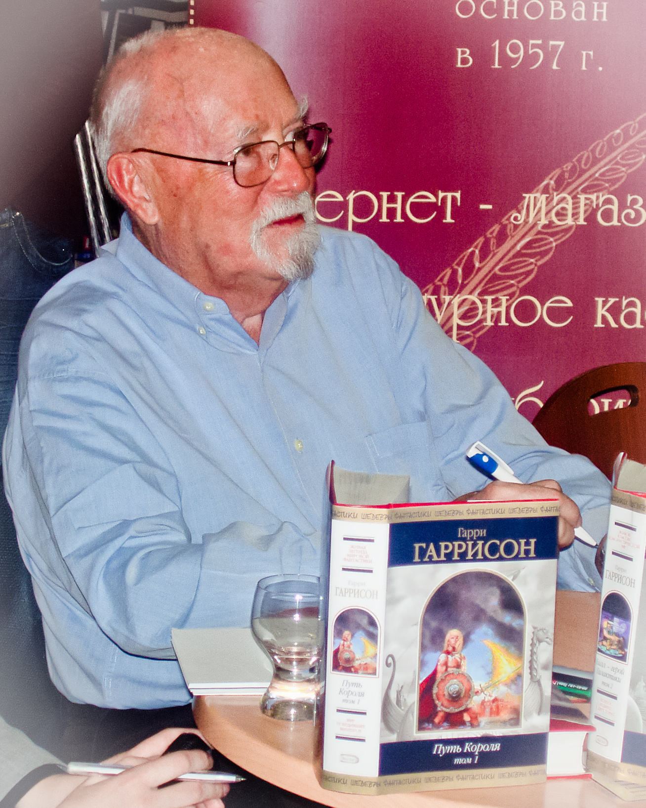 Гарри Гаррисон в Москве, 18 мая 2008